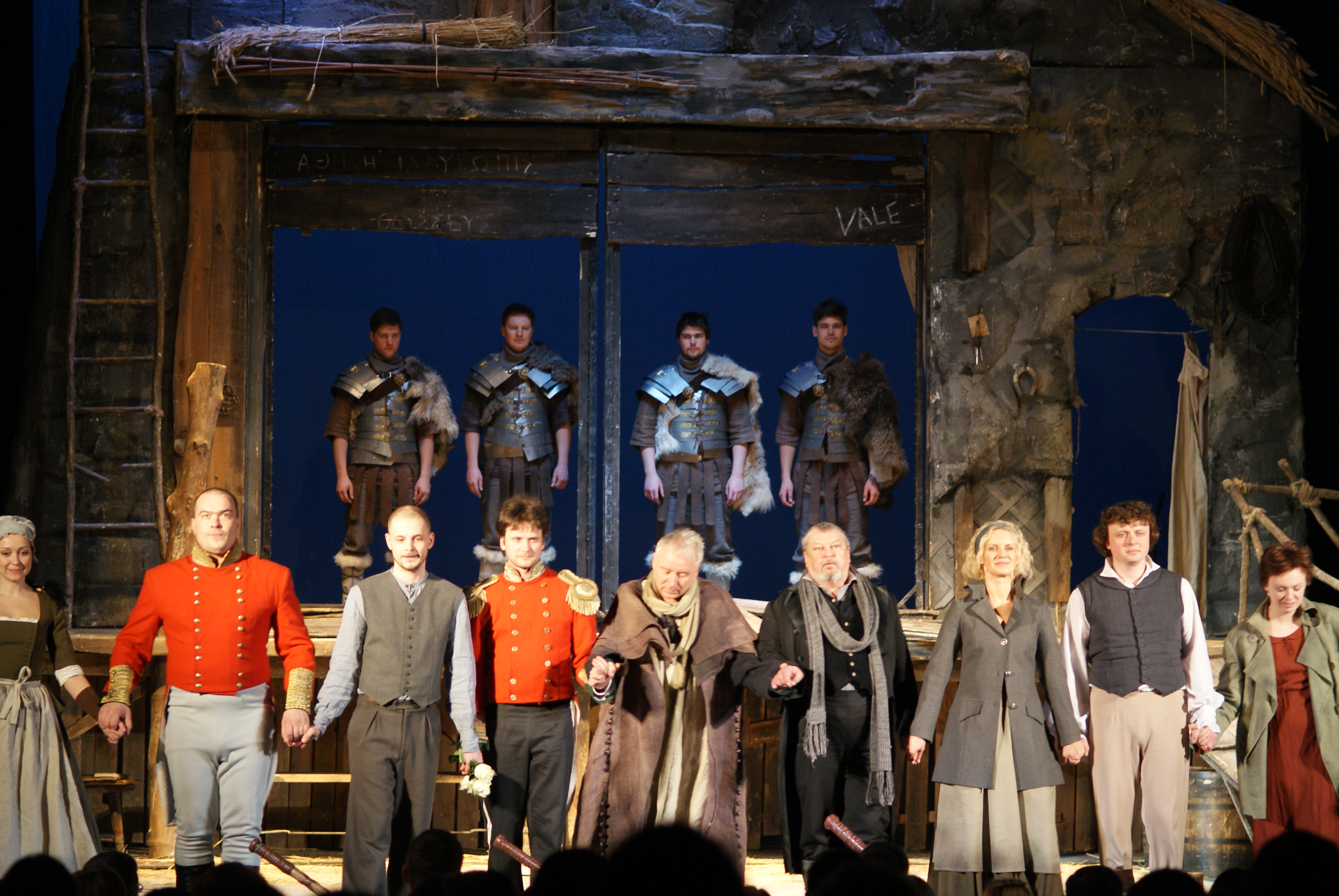 Translations Купалаўскага тэатру ў Палацы культуры прафсаюзаў. Мінск